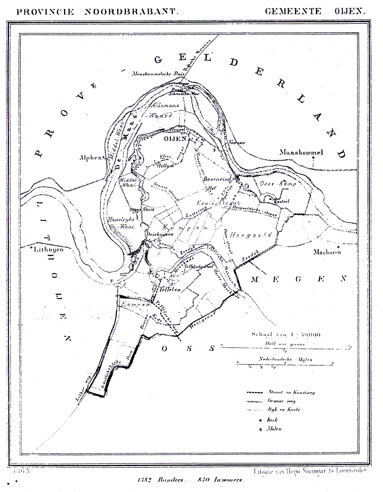 Nederland, Noord-Brabant, Gemeente Oijen